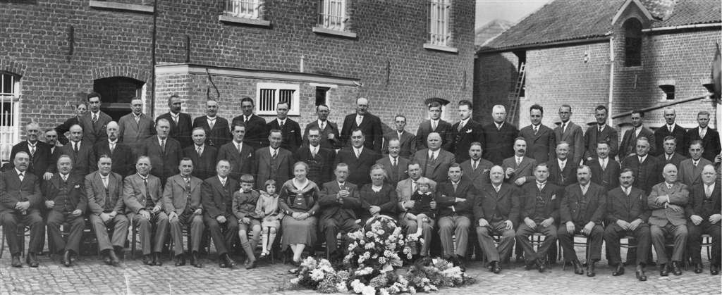 Vooraan in het midden Emile Eylenbosch en zijn gezin omringd door zijn klanten